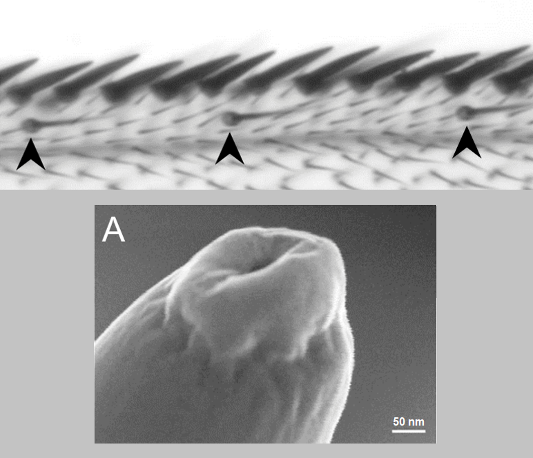 Fig 1. Sensilias en el ala de Drosophila. Margen del ala anterior de un ala de control. Las sensilias quimiosensoriales delgadas y curvadas se indican mediante puntas de flecha. Imagen de microscopio electrónico de barrido, de la punta de un pelo quimiosensorial en el ala. Barra de escala = 50 nm.